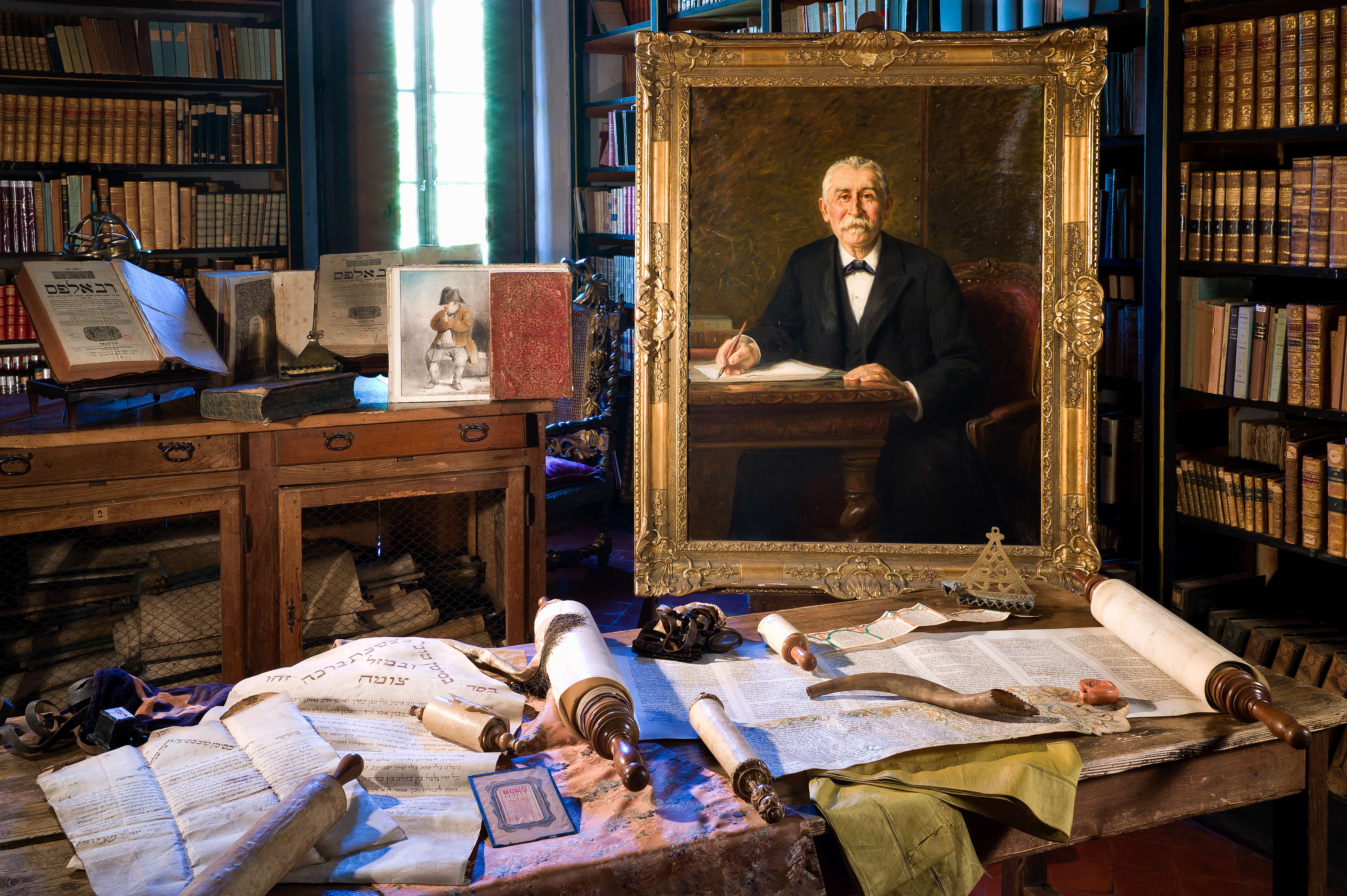 Bibliothèque Inguimbertine, manuscrits, Casimir Barjavel, Dr. Garsin-Cavaillon, Comtadine, Judaïca, rouleau d'Esther, Torah, Tefiline, ketouba. Musée Duplessis, musée Duplessis-Comtadin, Carpentras, Mgr d'Inguimbert